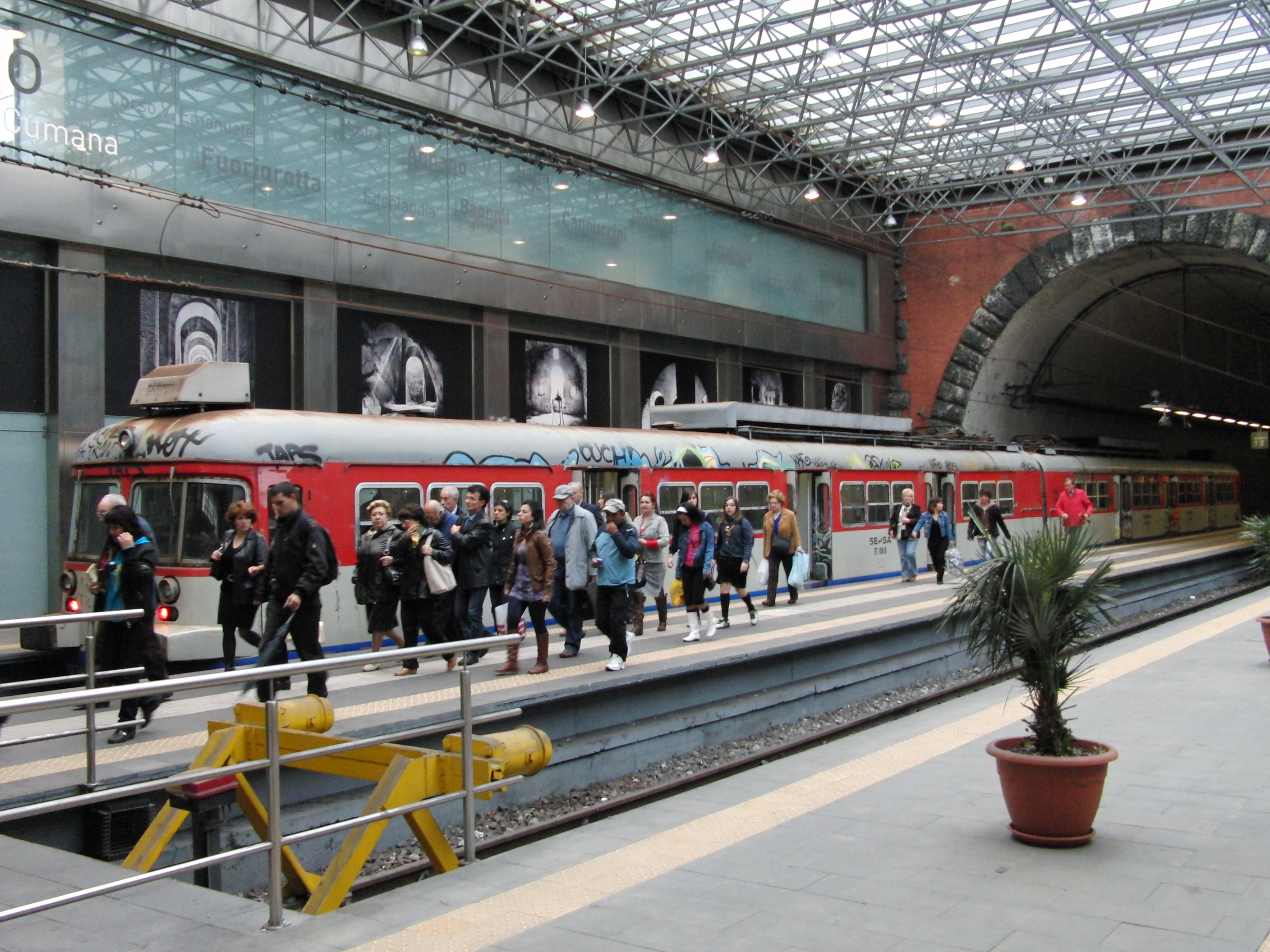 Stazione di Montesanto della SEPSA